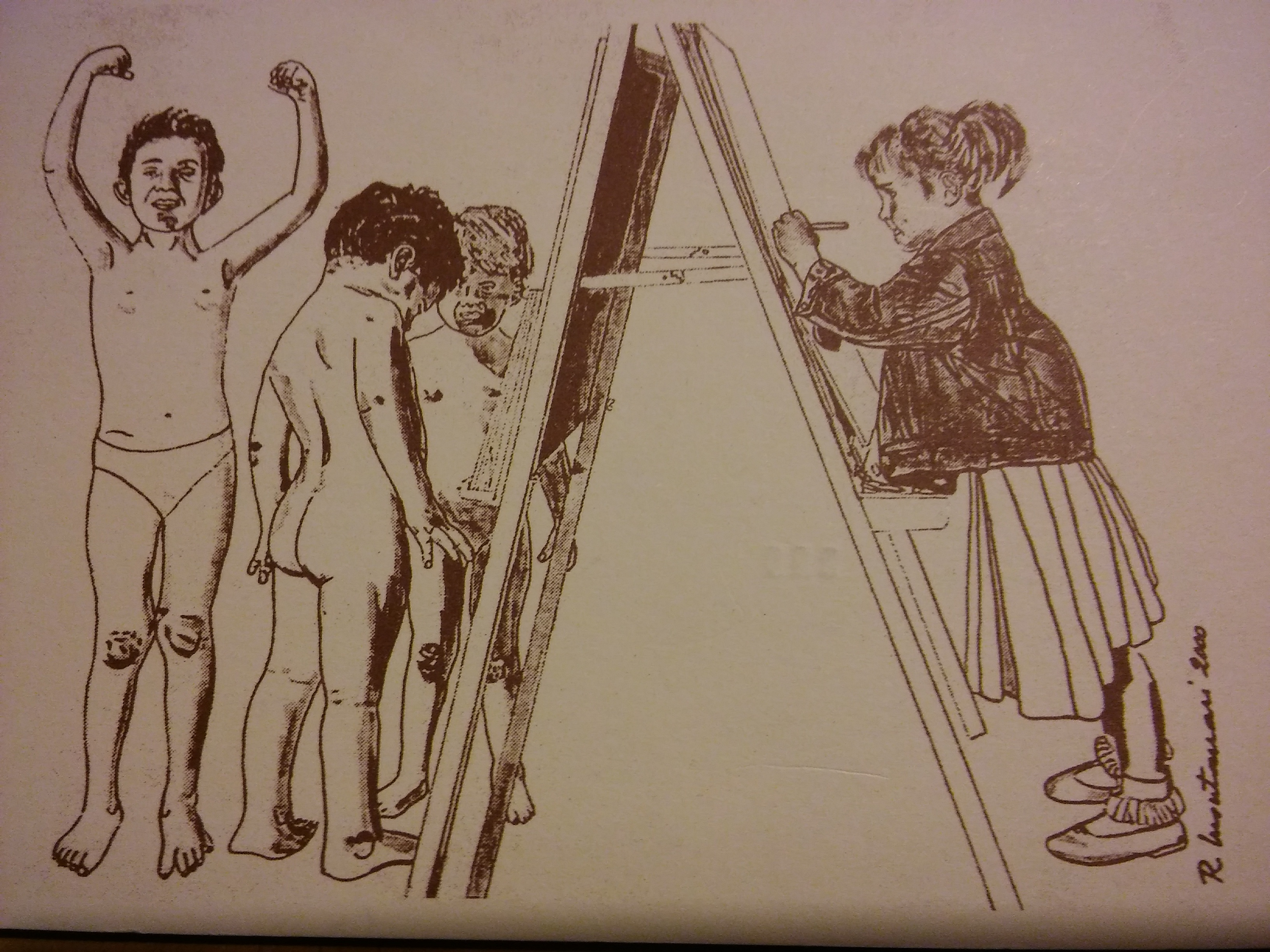 ganadora del premio "Arte e Lavoro" utilizada para la cancelación filatelica por "Poste Italiane"